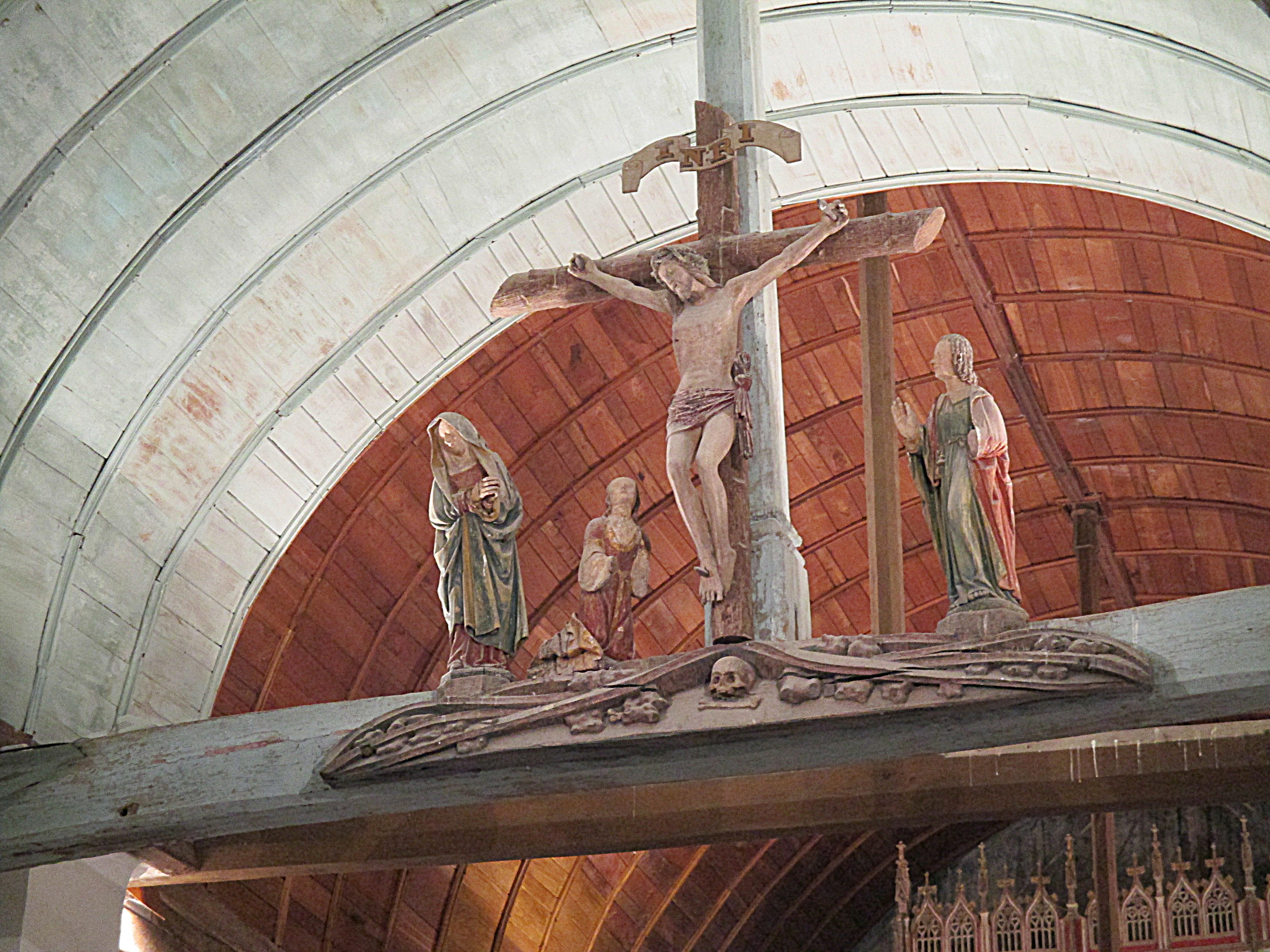 Poutre de gloire de l'église de Brétagnolles (Eure)